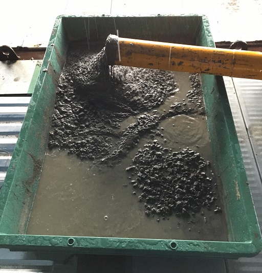 配管に残った生コンの処理